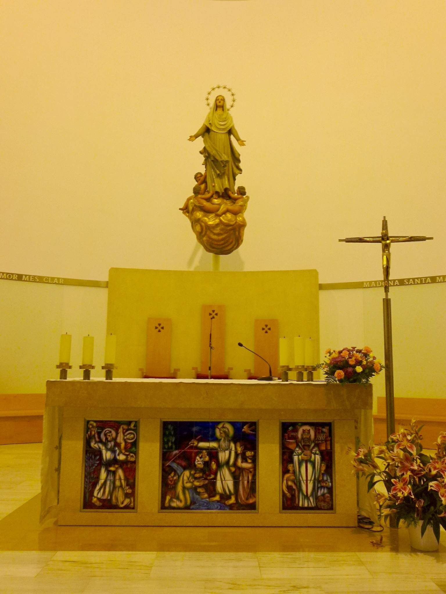 Iglesia de Santa María (Badalona)